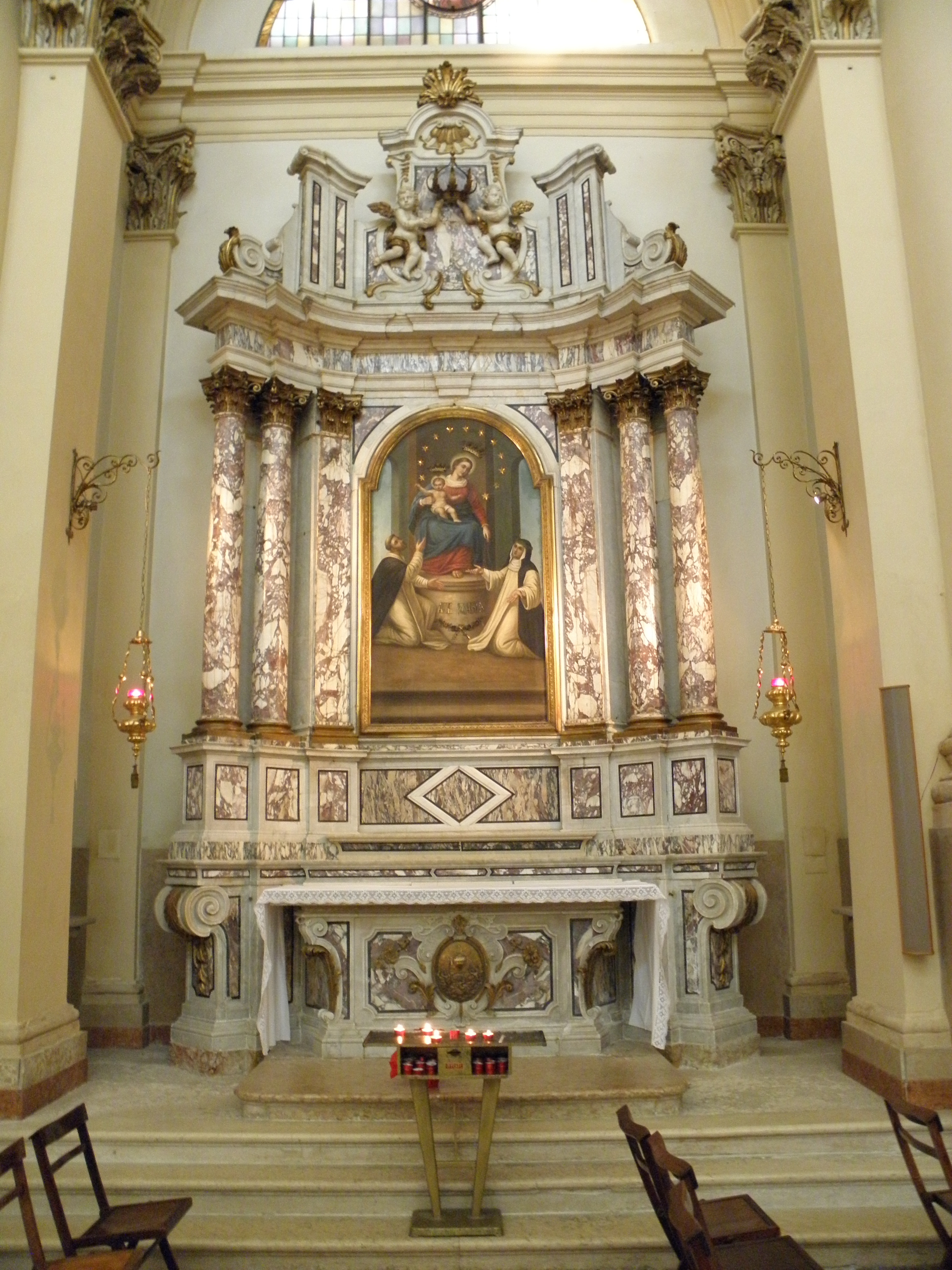 Legnago, Duomo di San Martino Vescovo: l'altare dedicato alla Madonna del Rosario (il secondo da sinistra).